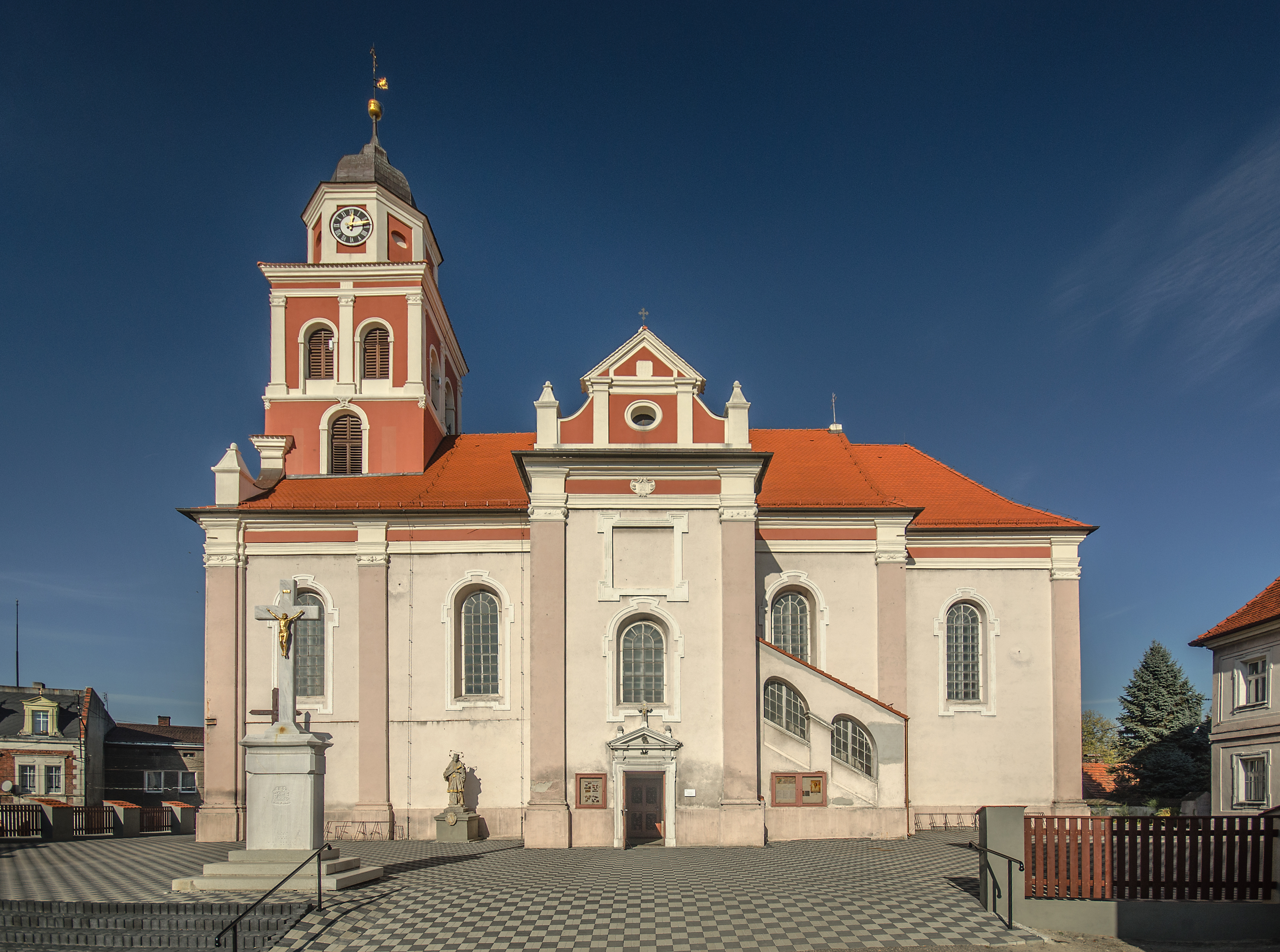 Prószków, kościół par. p.w. św. Jerzego, 1687, XIX